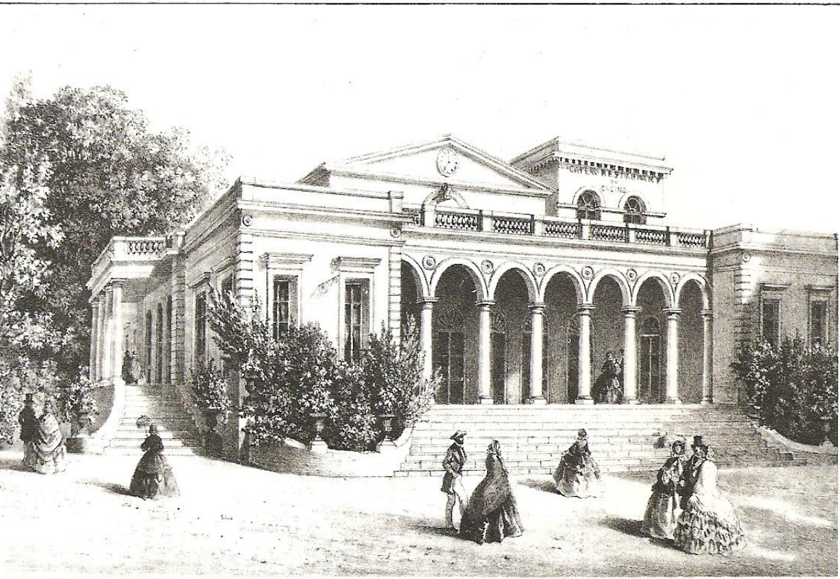 Le premier casino de Foncillon à Royan (construit en 1845)